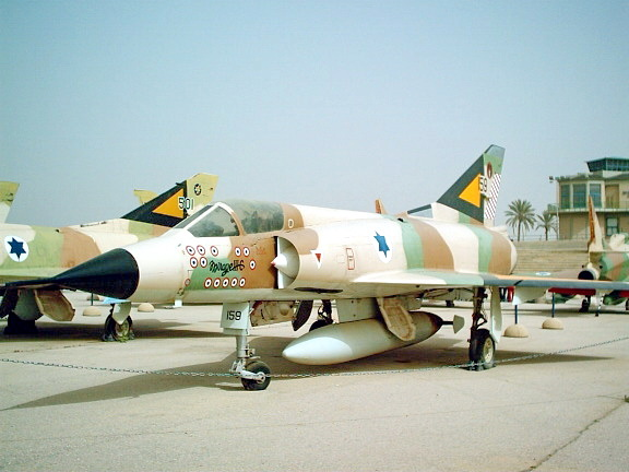 Un Mirage III dans le "Israeli Air Force Museum" (Musée Aéronotique d'Israël)